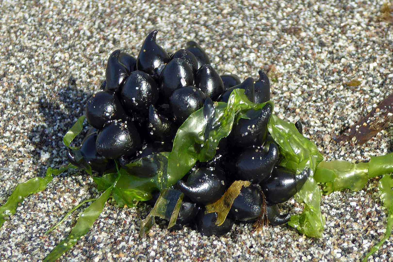 Sepia officinalis Eiklumpen, angeschwemmt an einem Strand in der Nähe von Nerja, Spanien